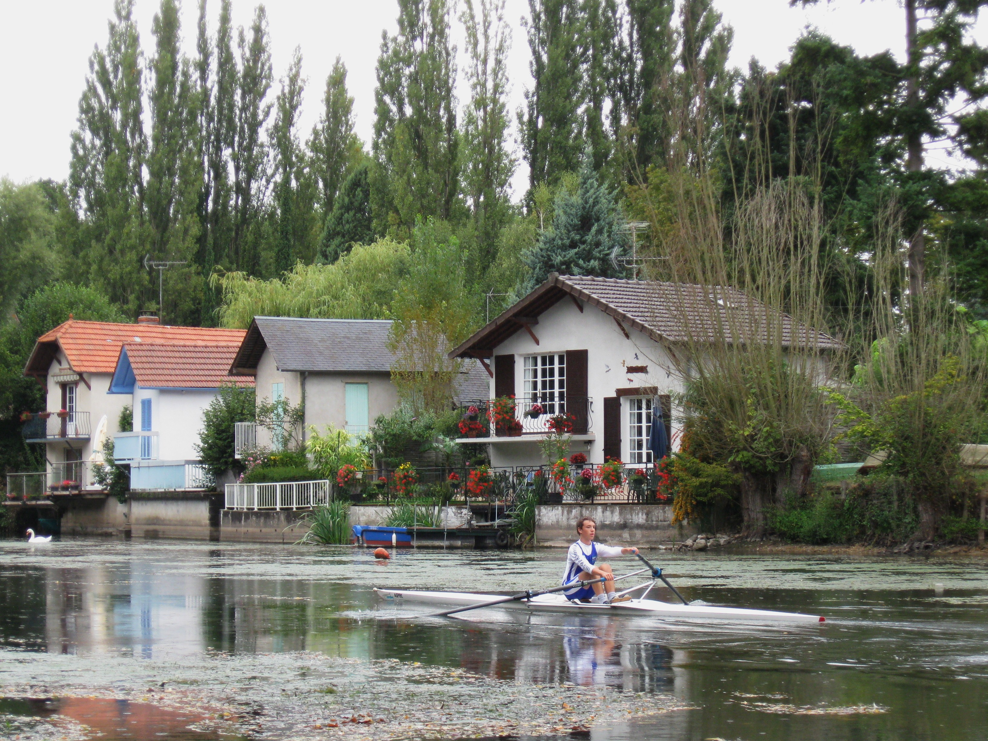 Le Loiret près du pont Cotelle, Olivet, Loiret, France